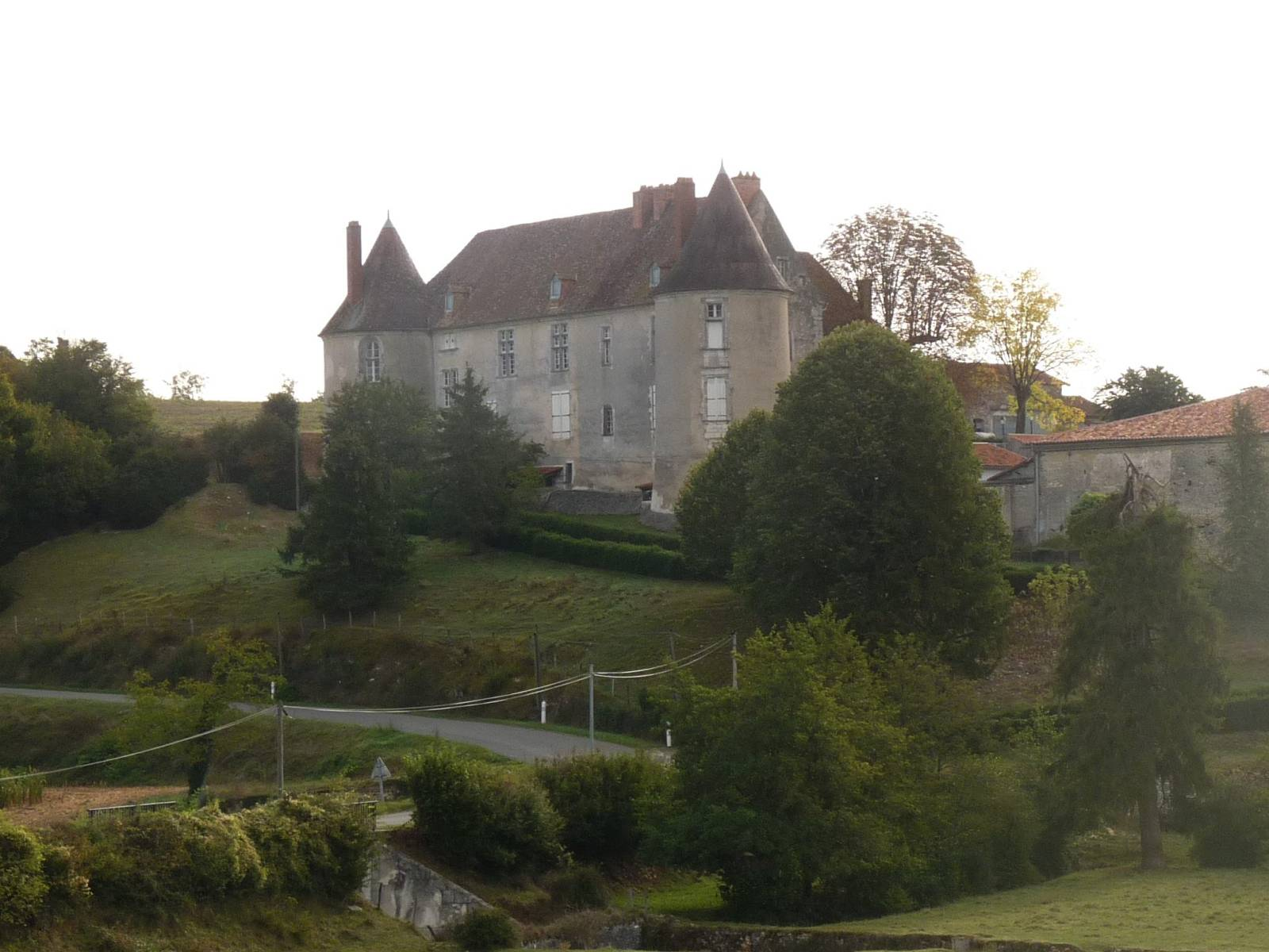 château de Sansac, Beaulieu-sur-Sonnette, Charente, France